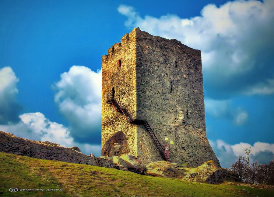 Vršačka kula